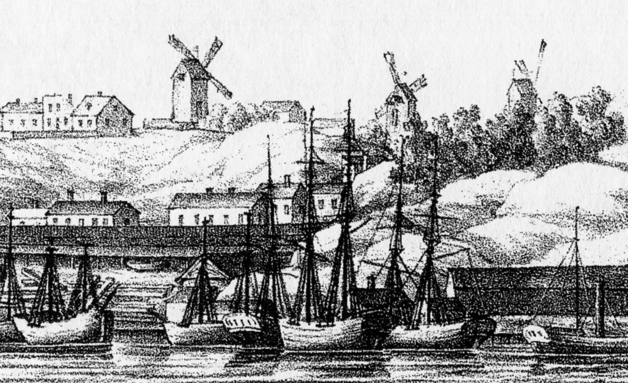 Södra varvet och Bagarkvarnen på Hårdhs panorama 1836 (bilden är beskuren)